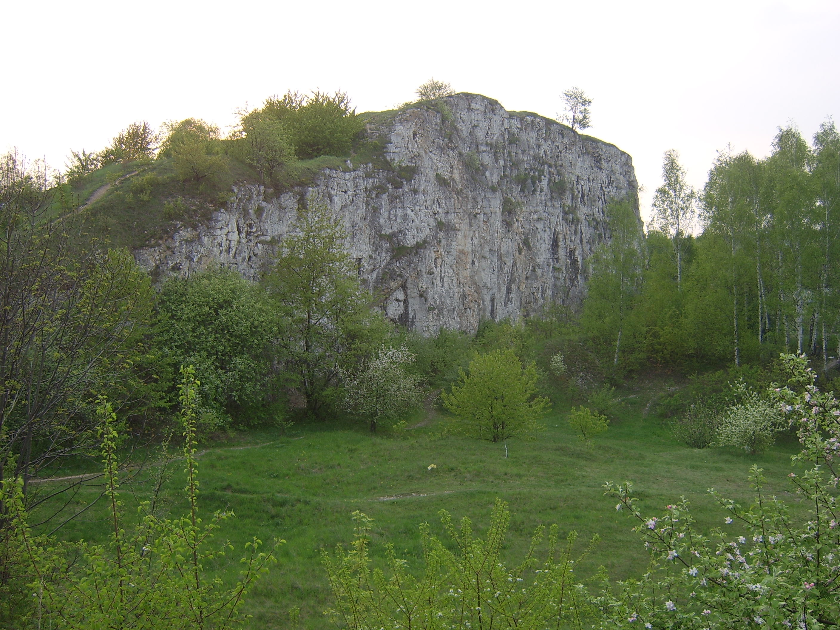 Limestone rocks in Twardowski Rocks, Zakrzówek, Kraków